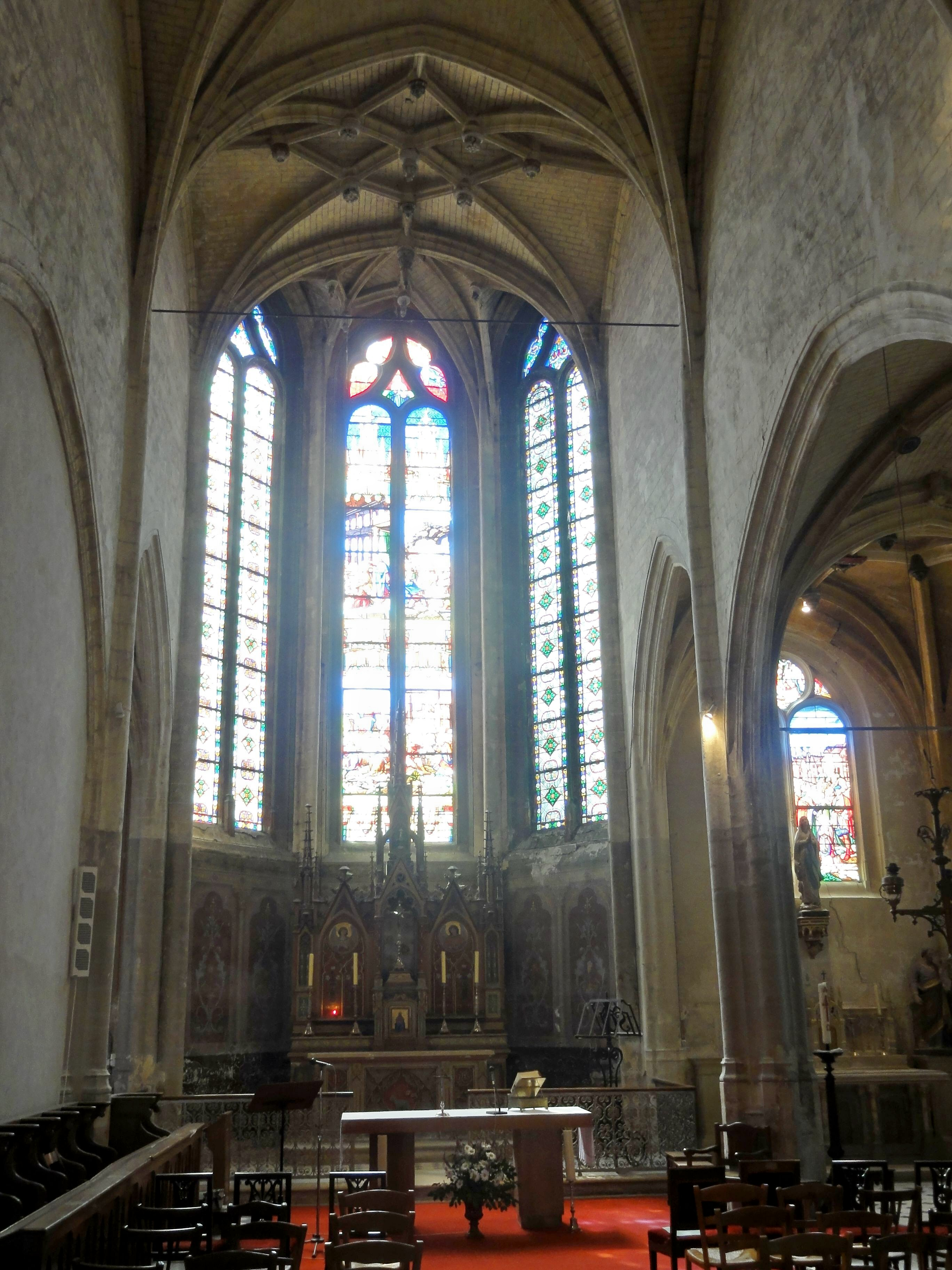 Chœur.